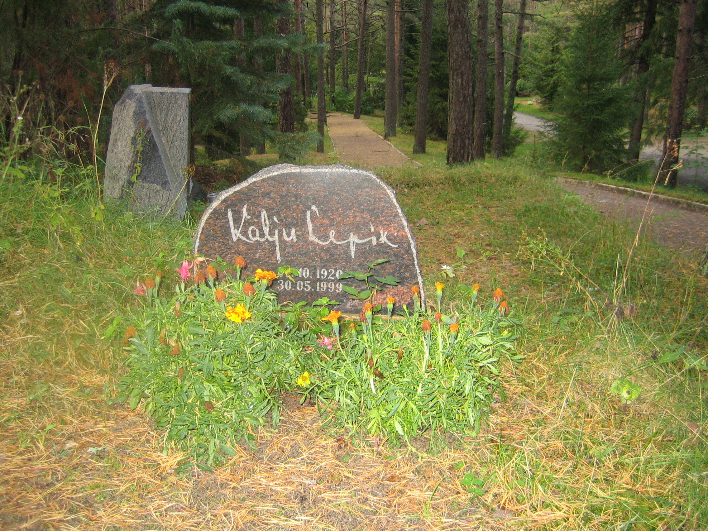 Kalju Lepiku haud